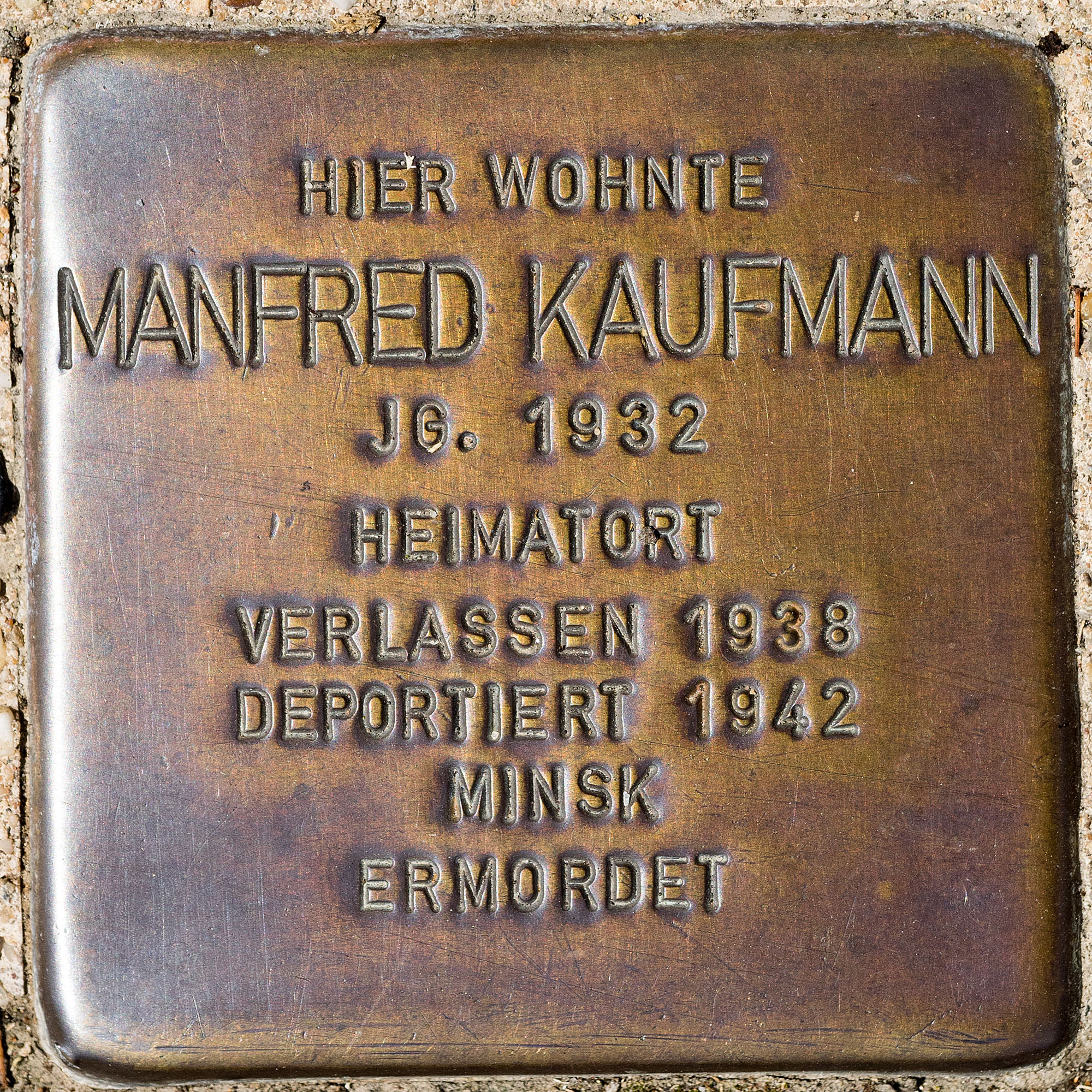 Stolpersteine Roki: Kaufmann, Manfred